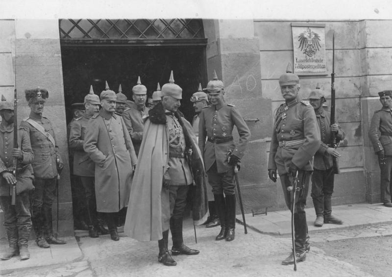 Der Kaiser [Wilhelm II.] und Generalfeldmarschall [August] von Mackensen auf dem südöstlichen Kriegsschauplatz